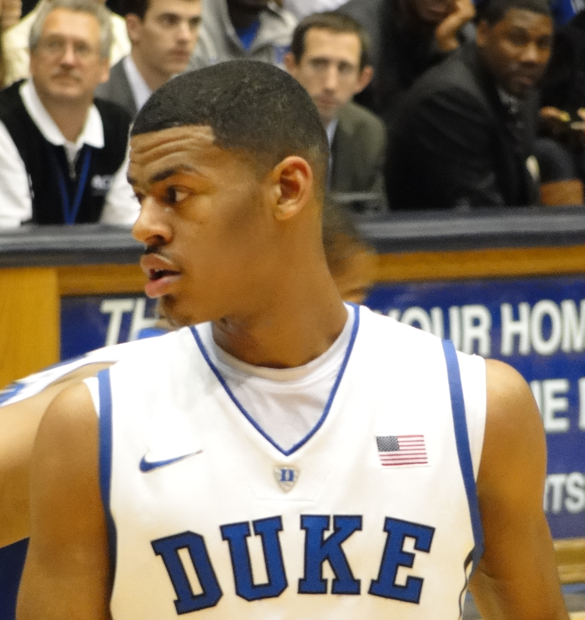 Quinn Cook in December 2011.